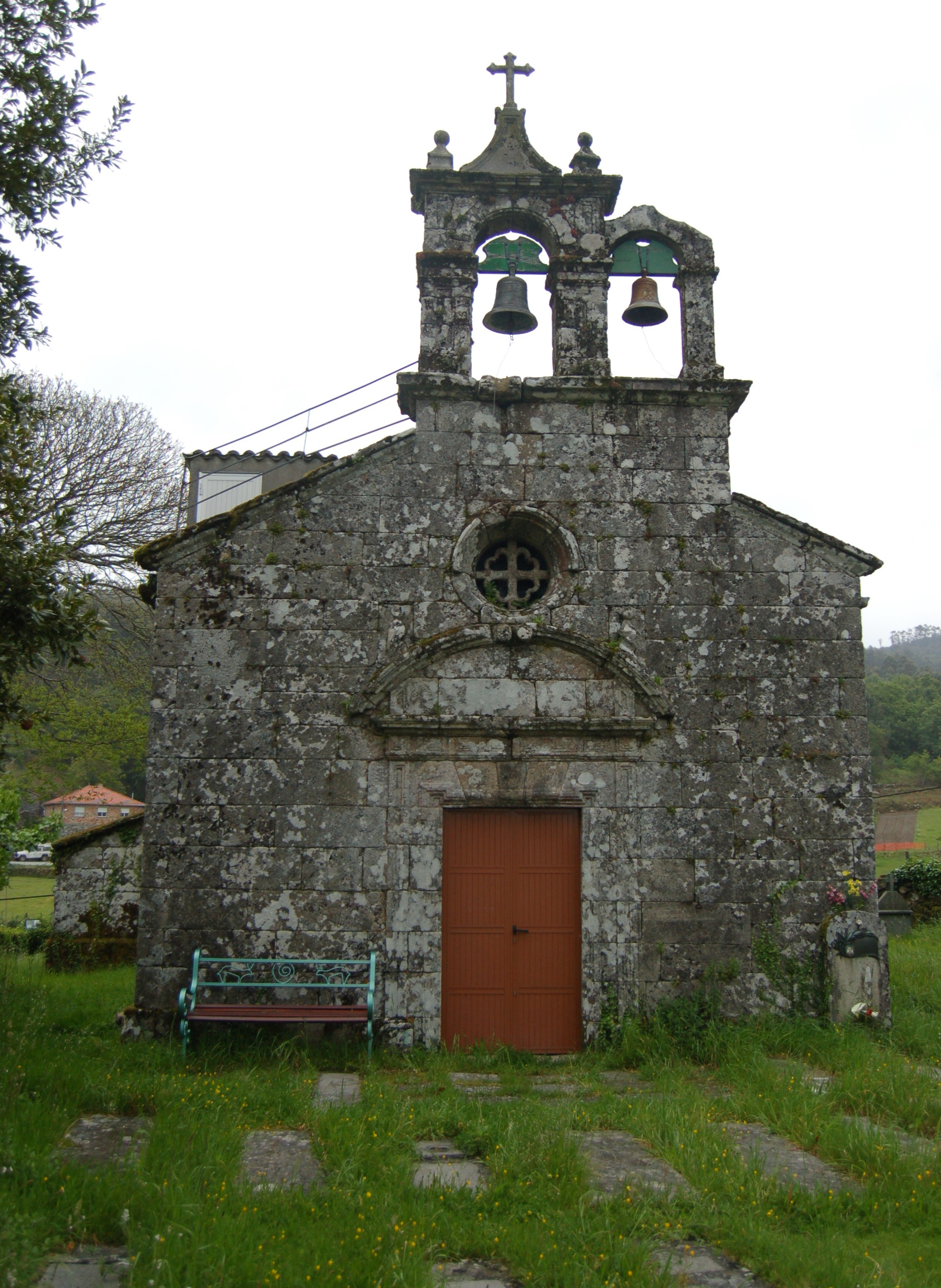 Igrexa parroquial de Santiago de Morillas (Campo Lameiro)